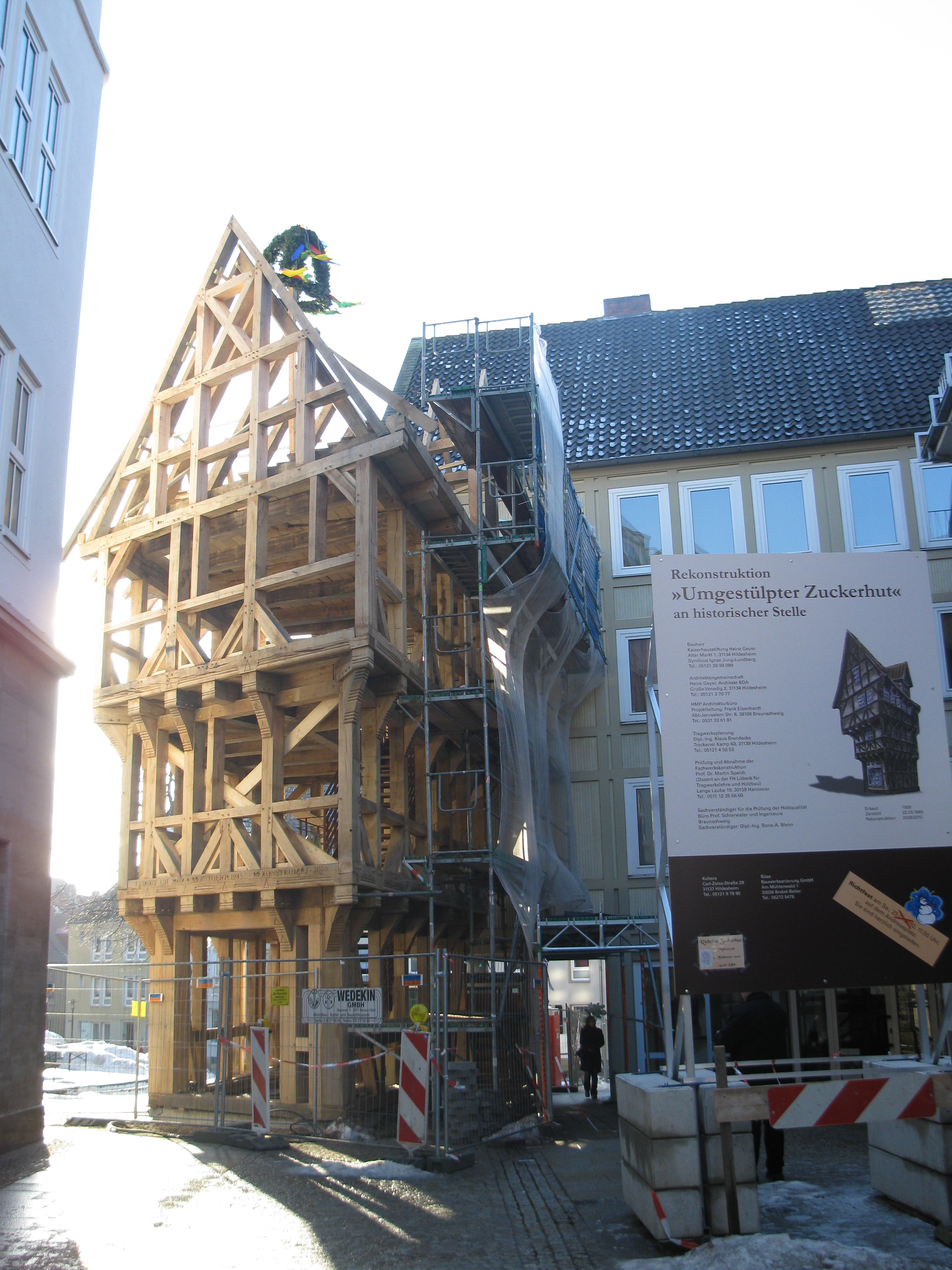 Pain de Sucre renversé de Hildesheim. Fete du bouquet.